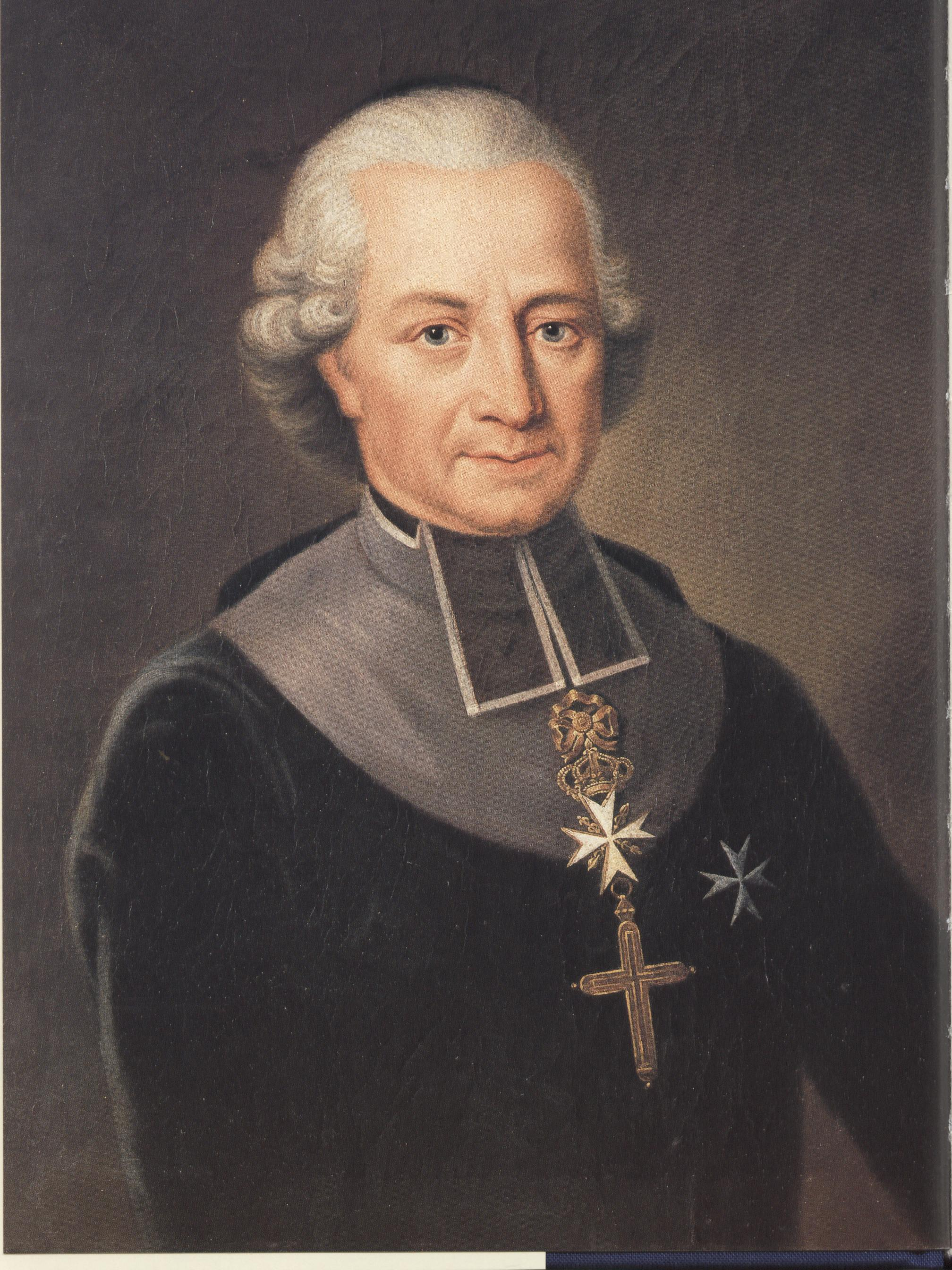 Cardinale von Häffelin